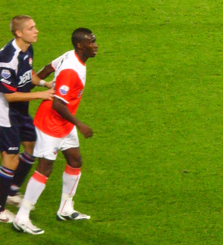 Jens Janse en Loïc Loval tijdens een uitwedstrijd van Willem II tegen FC Utrecht